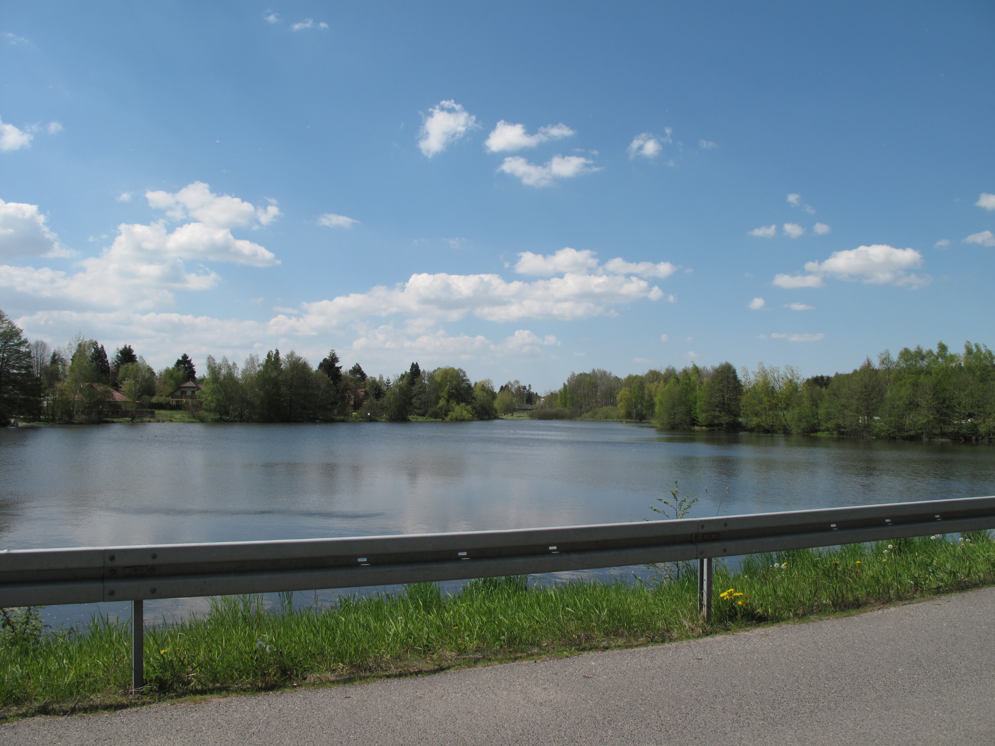 Rybník Požár na Jevanském potoce. Okres Praha-východ, Česká republika.